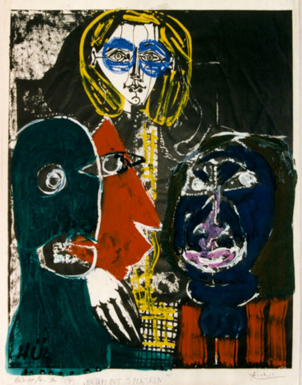 Farbig übermaltes Picasso-Poster von I. Hünerfauth. Titel: Maden mit 3 Masken, 1972